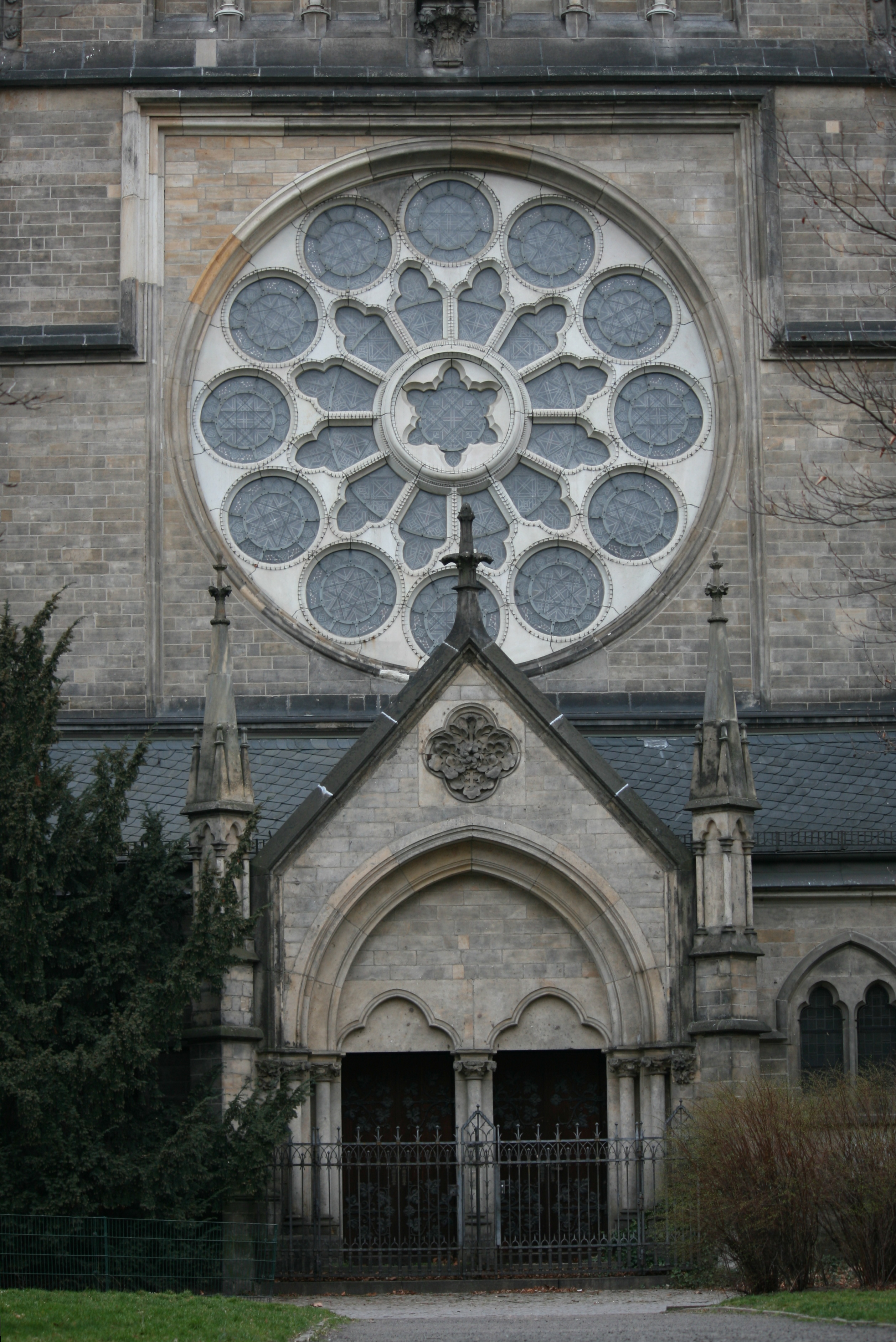 Osteingang der St. Sebastiankirche, Berlin